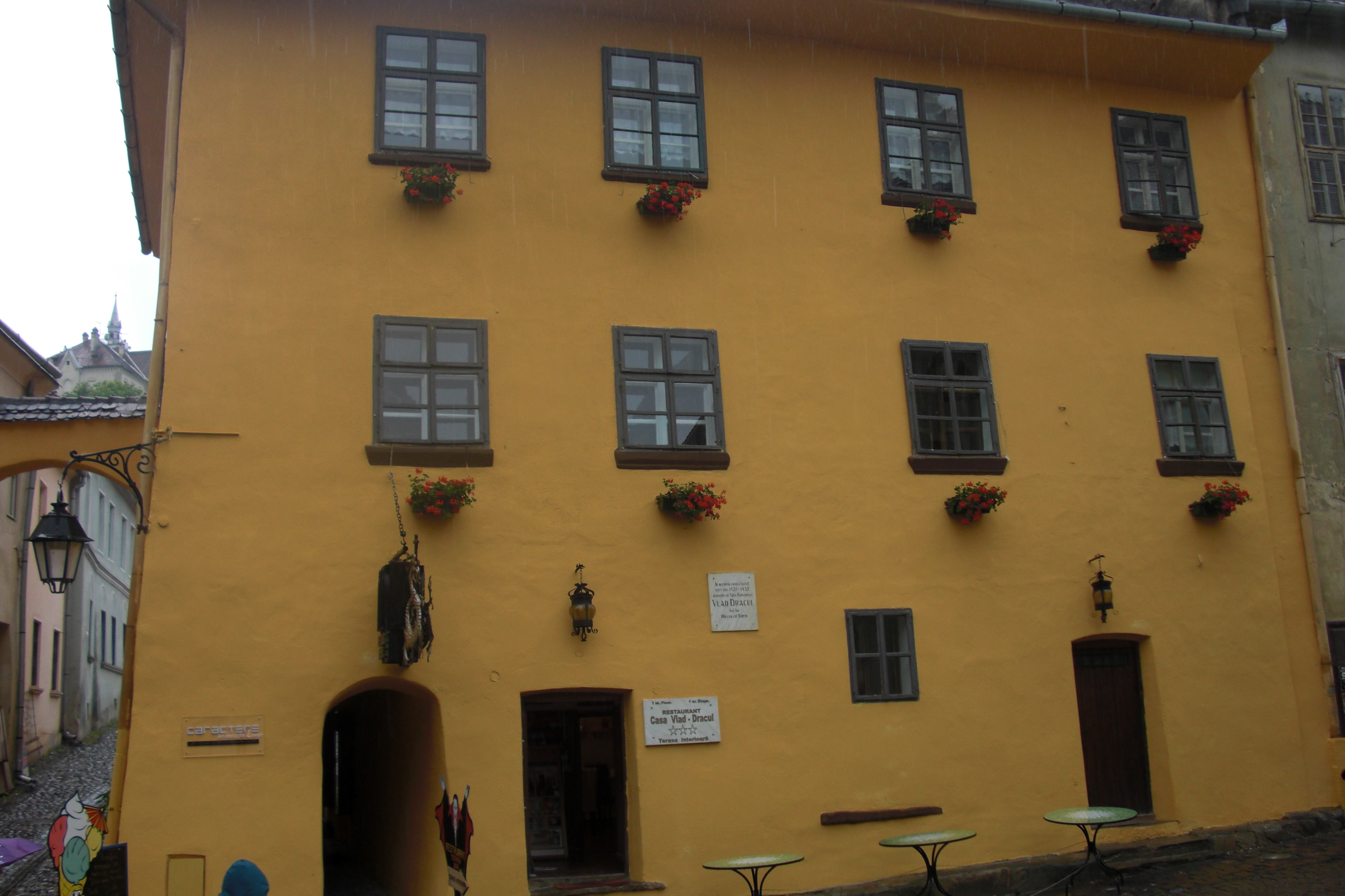 Maison natale de Vlad Dracul en Transylvanie